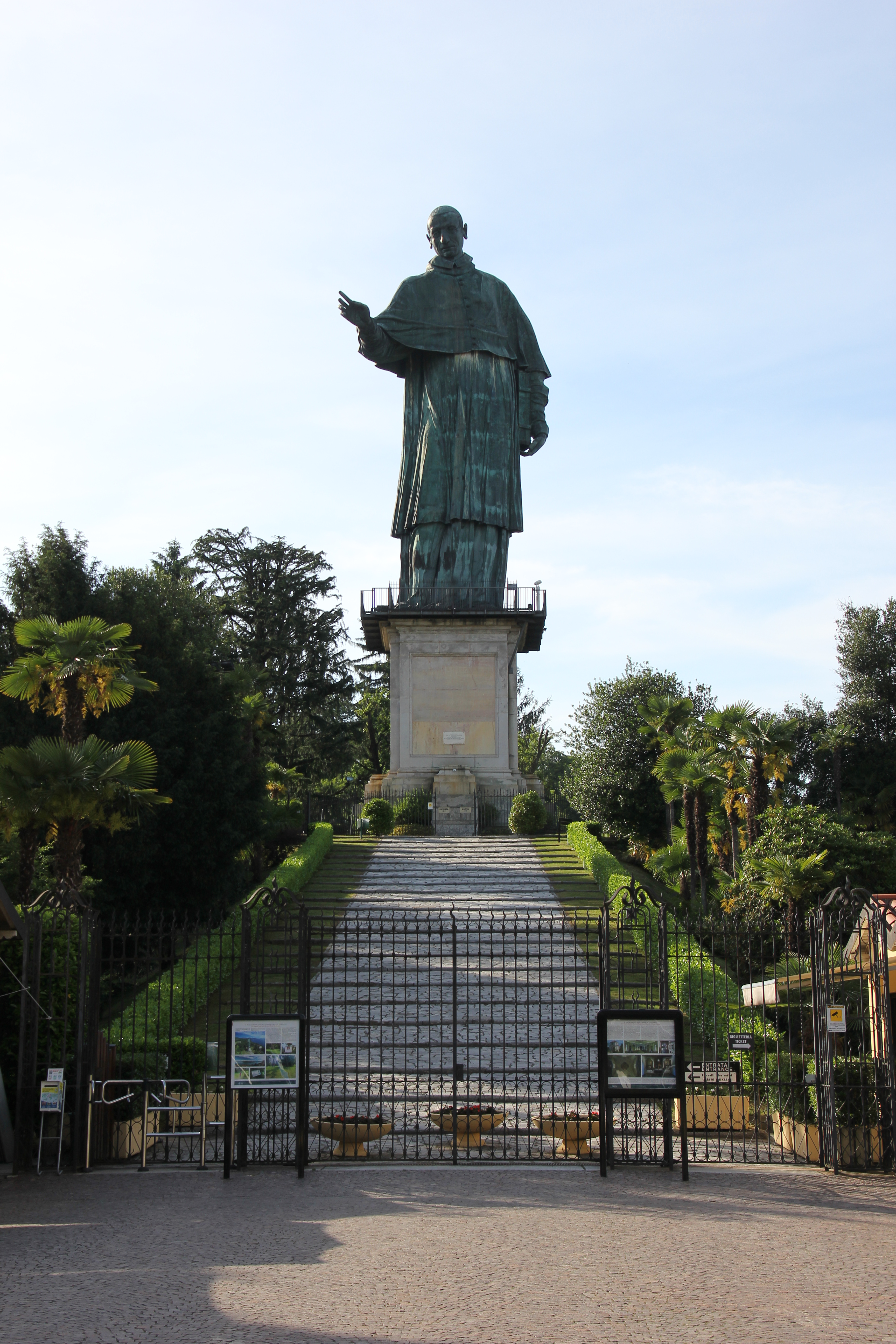 Arona, statua di San Carlo Borromeo